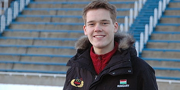 Knoch Viktor magyar gyorskorcsolyázó